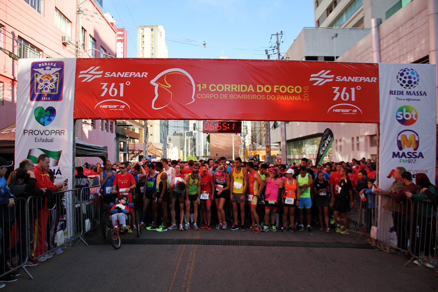 1ª Corrida do Fogo - Largada em 12 de out. de 2016